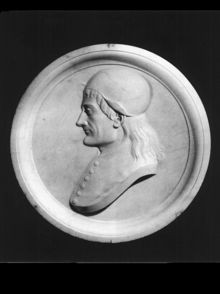 Medaglione di Lazzaro Moro, opera di Pietro Bearzi precedente al 1847. Il busto fa parte del Panteon Veneto, conservato presso Palazzo Loredan di Campo Santo Stefano a Venezia.